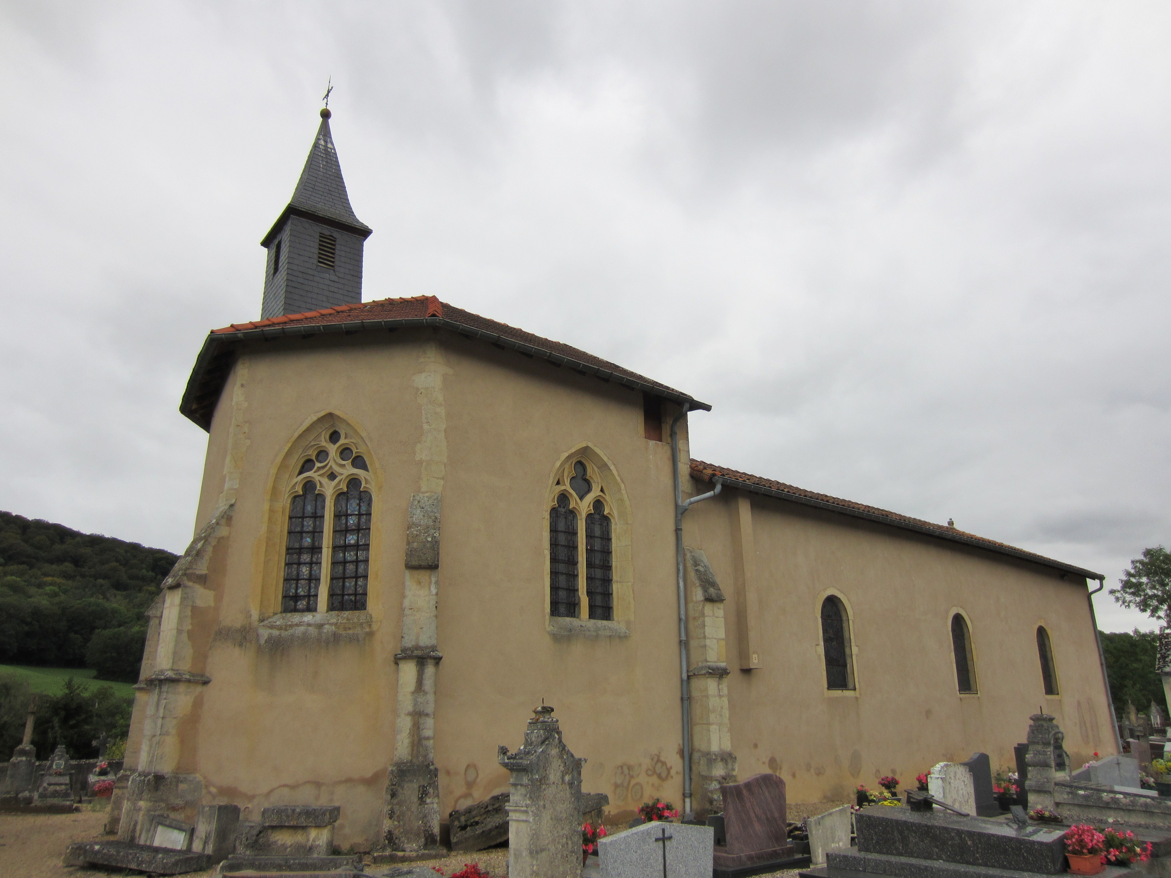 Description chapelle Arnaville chapelle Arnaville